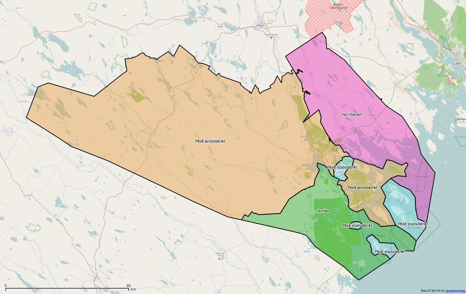 Distriktsindelningen i Piteå kommun World file: 187.32896515417513683 0 0 -187.32896515417513683 2168064.79776832554489374 9804930.01665361039340496